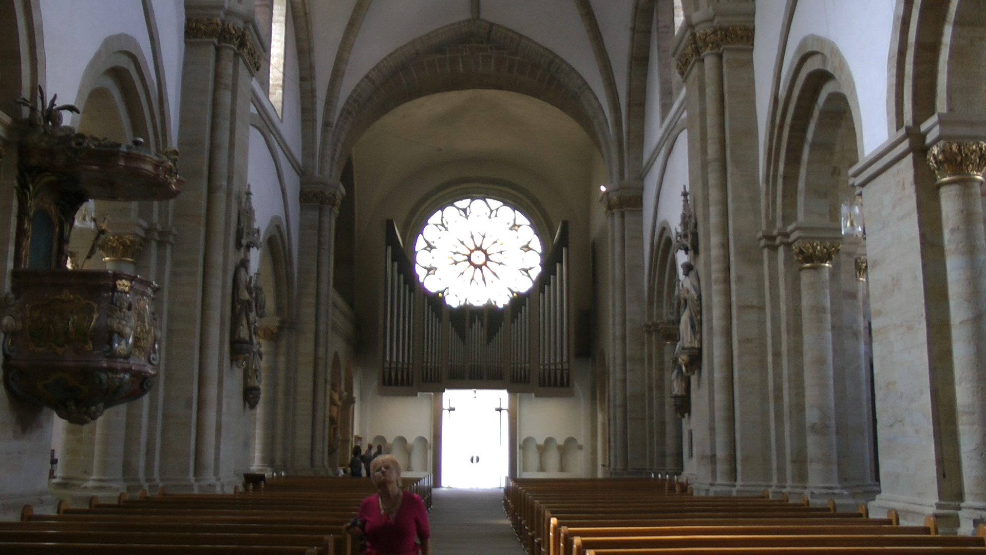 Das Bild zeigt die Hauptorgel im Dom St. Peter in Osnabrück